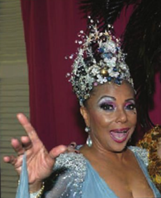 Eliana Pitman no Carnaval de 2013.